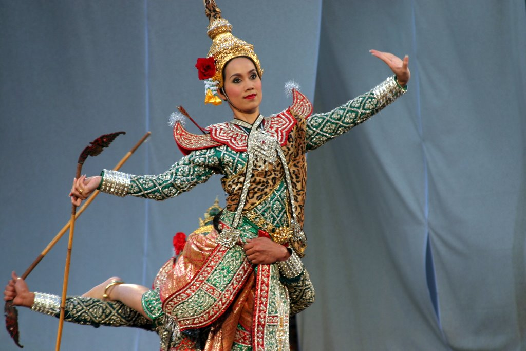 Hahoe Folk Village in Andong, Gyeongsangbuk-do, South Korea.